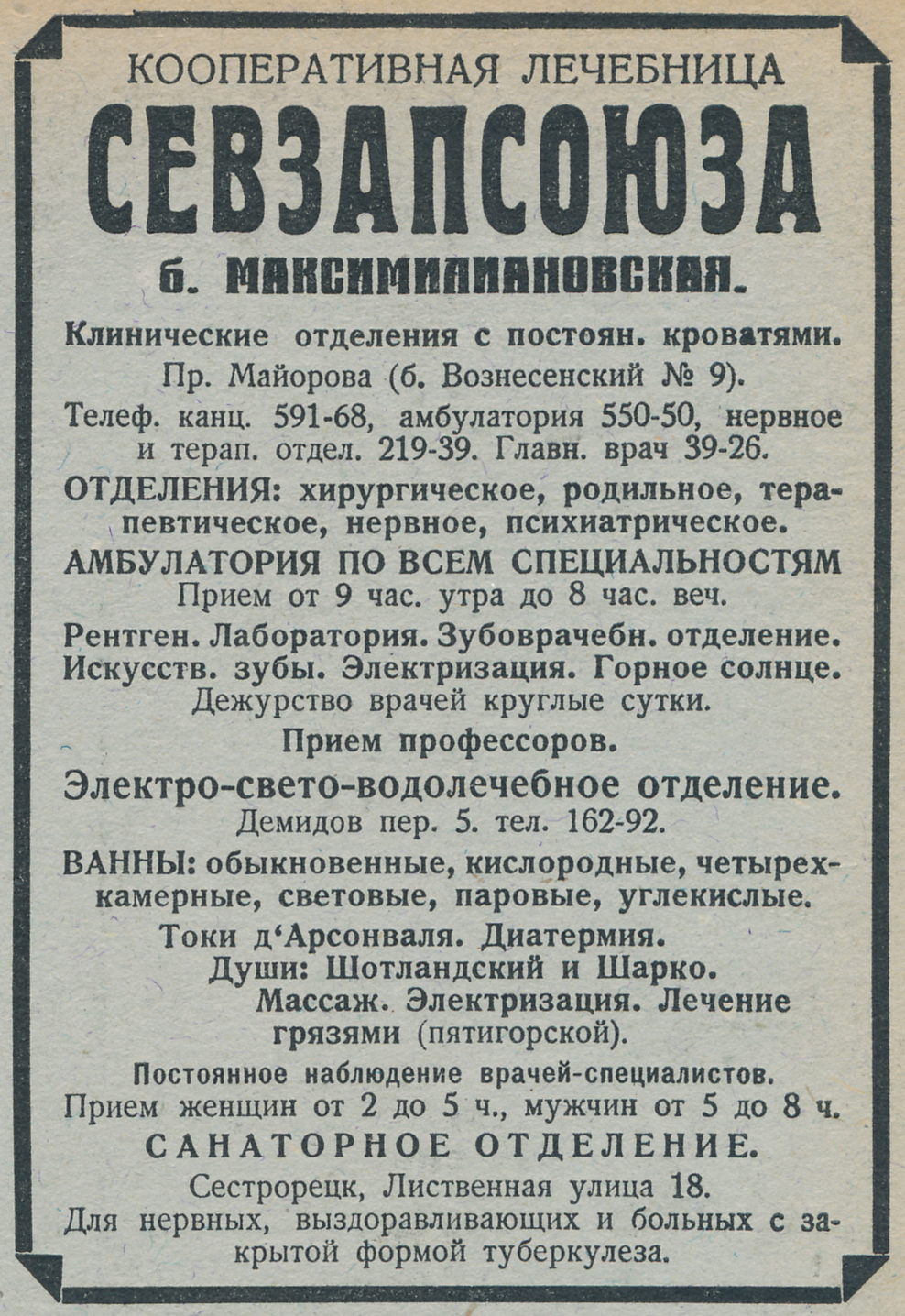 Реклама лечебницы Севзапсоюза (б. Максимилиановской), 1927 год.